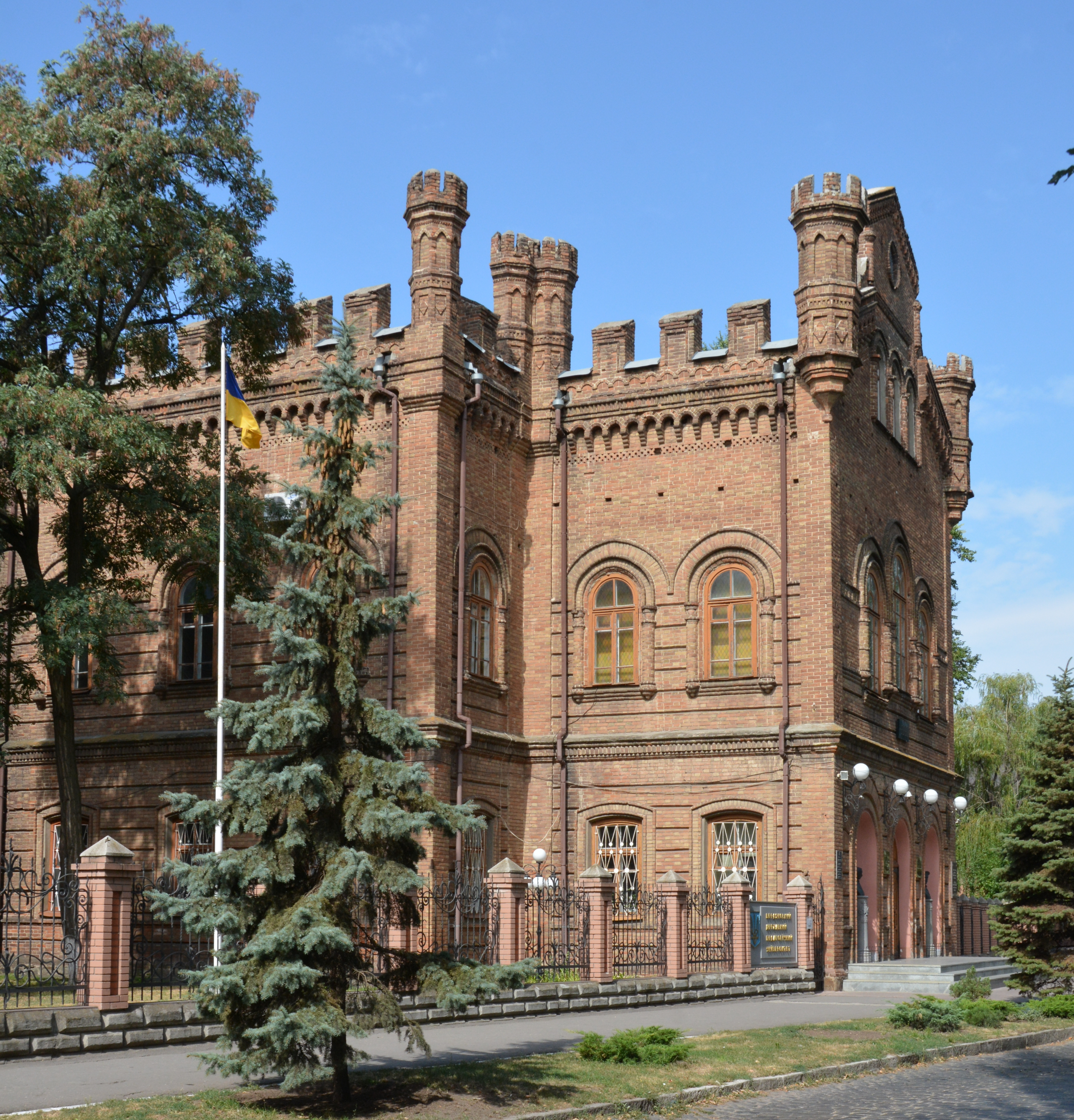 Будинок чоловічої класичної гімназії, в якій навчався один з керівників Севастопольського збройного повстання 1905 року П. П. Шмідт , Бердянськ, вул. П. Шмідта, 4